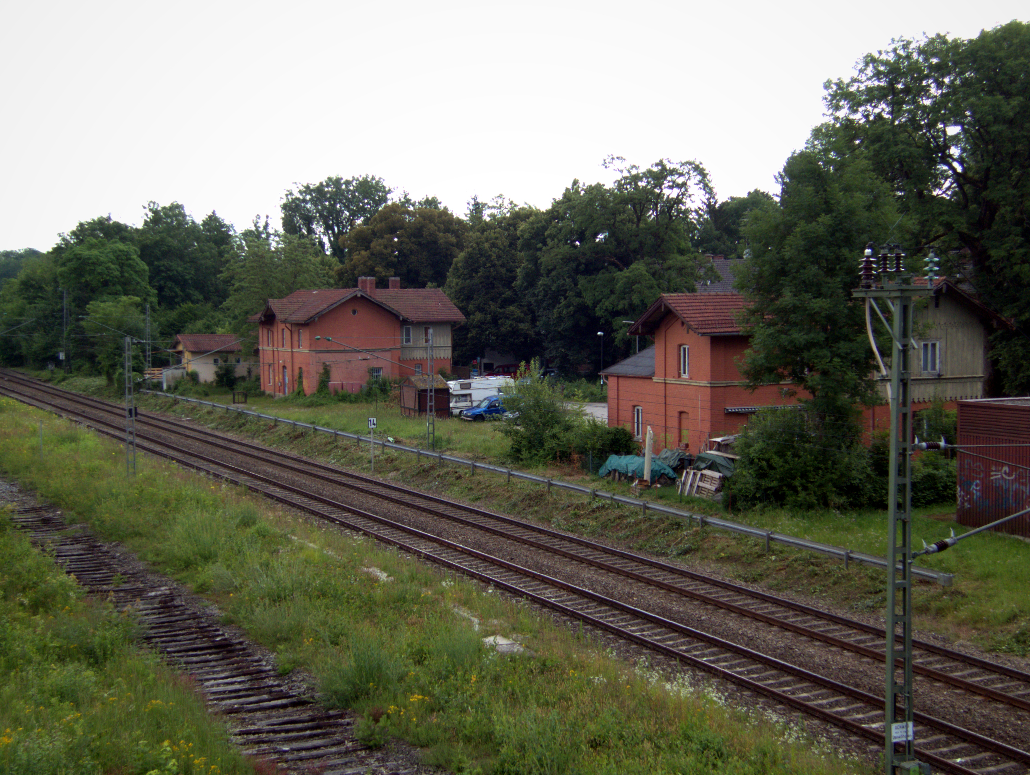 Ehemaliger Staatsbahnhof Großhesselohe gleich neben der Großhesseloher Brücke. Ansicht von der Brücke der Großhesseloherstraße.